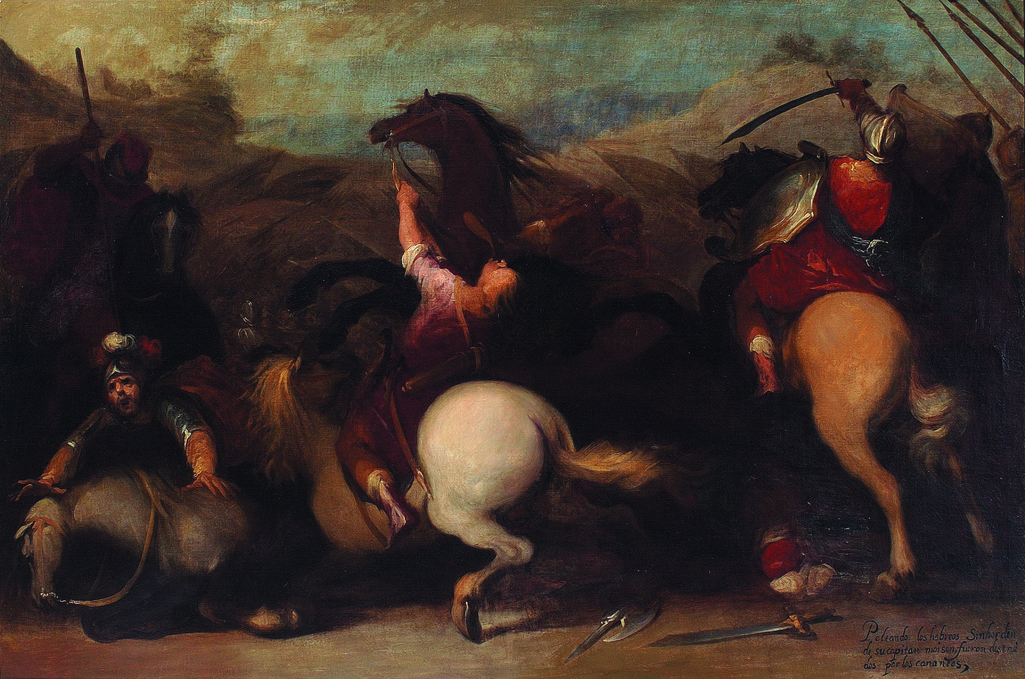 Matías de Torres, Victoria de los cananeos sobre los hebreos, Universidad de Zaragoza